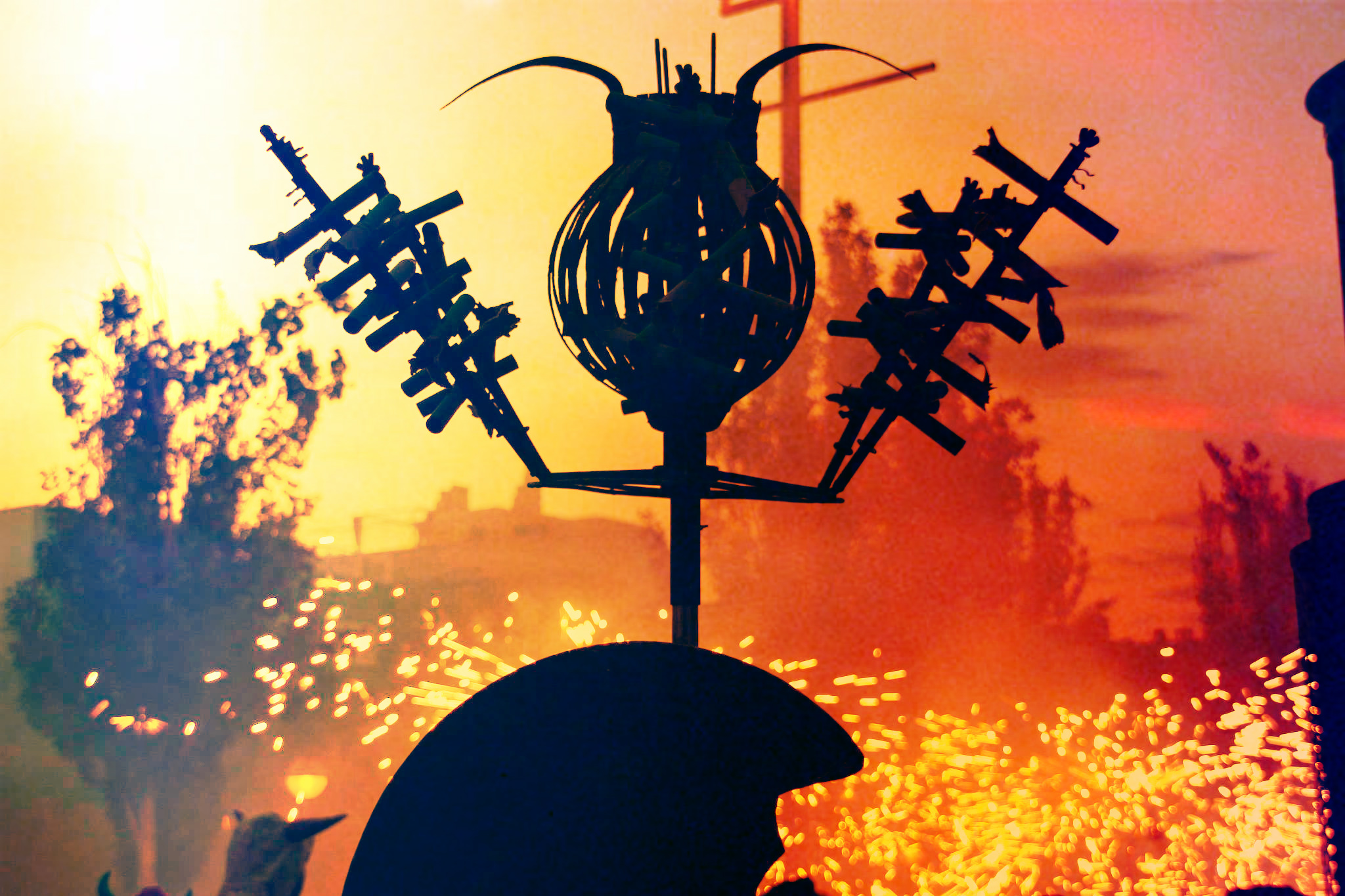 Llucifer Ball de Diables de Sabadell